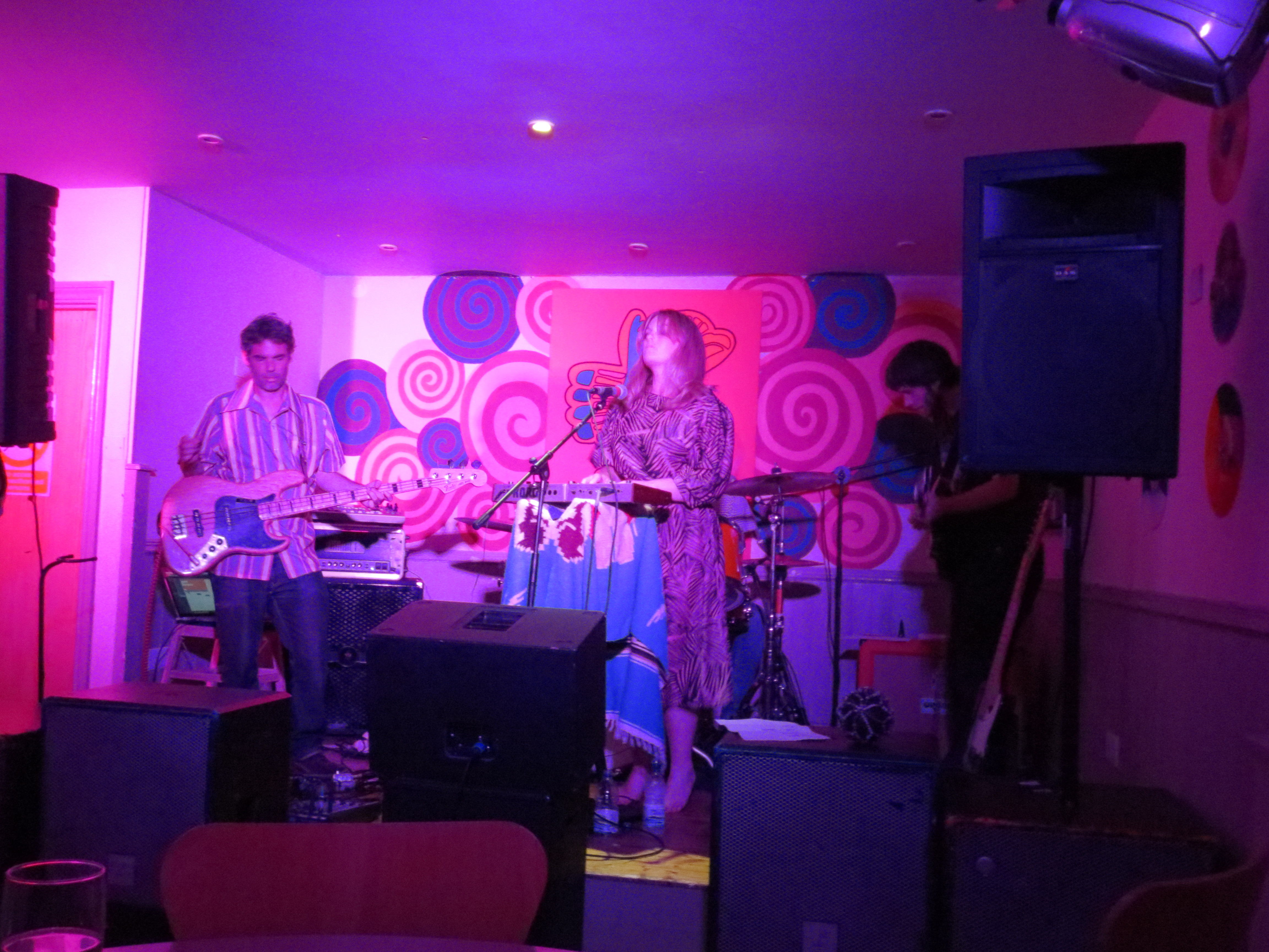 Gulp yn chwarae Tafarn Parrot, Caerfyrddin